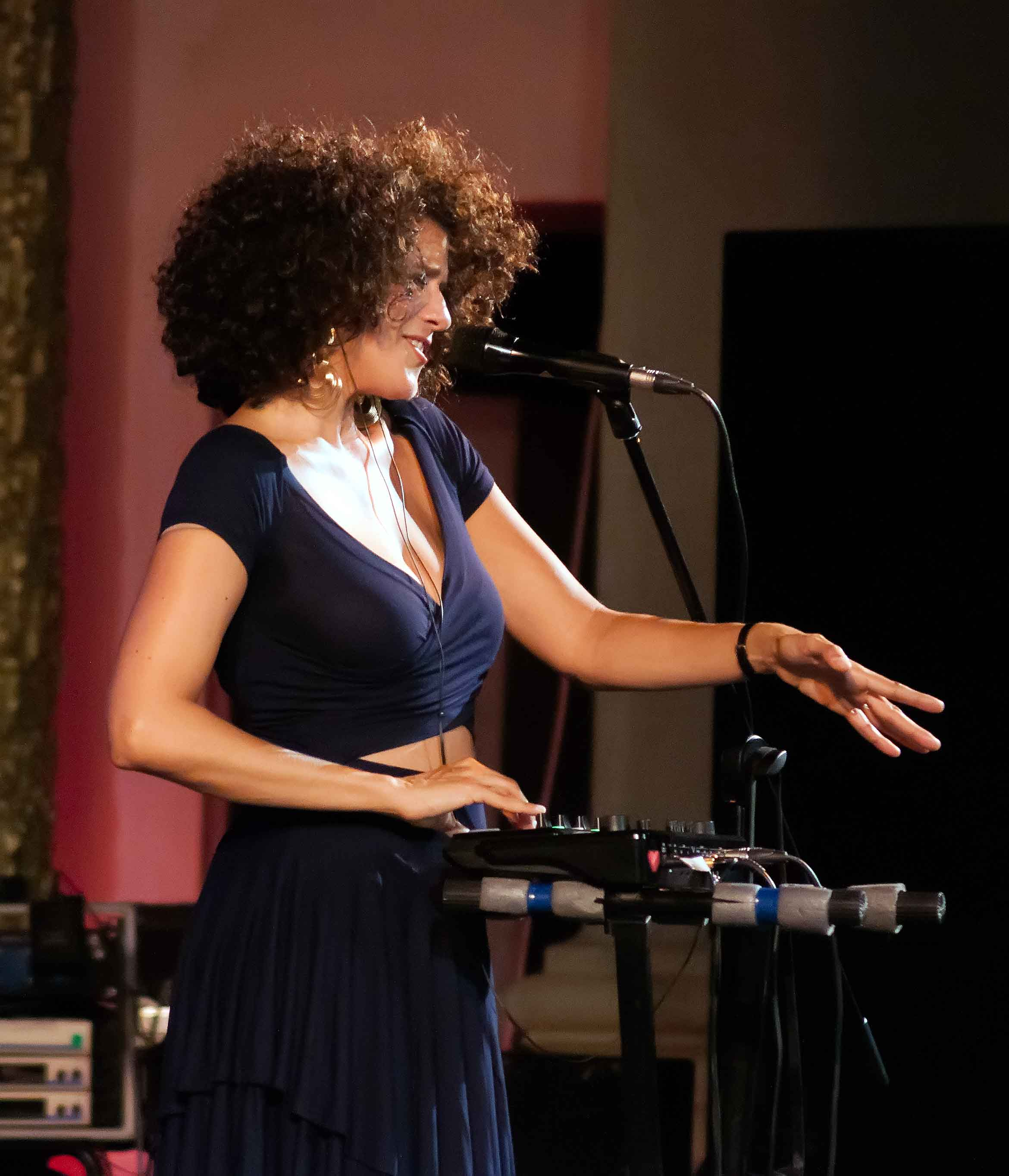 Sochi Jazz Fest 2018